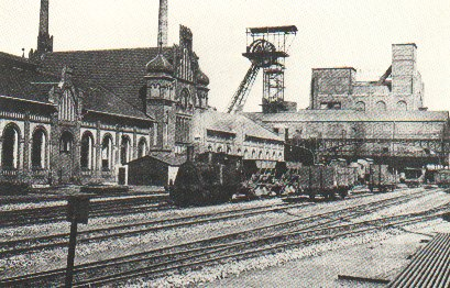 Dortmund-Bövinghausen, Anfang 20. Jh.